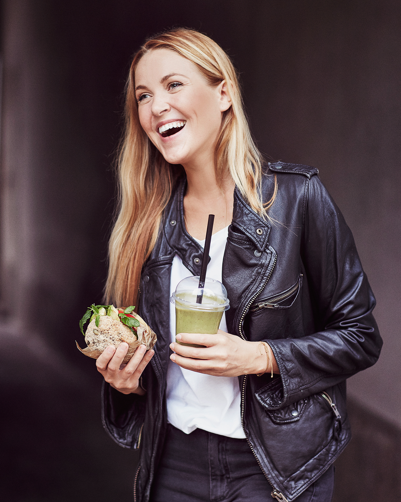 Virpi Mikkonen. kuvaaja: Riikka Kantinkoski